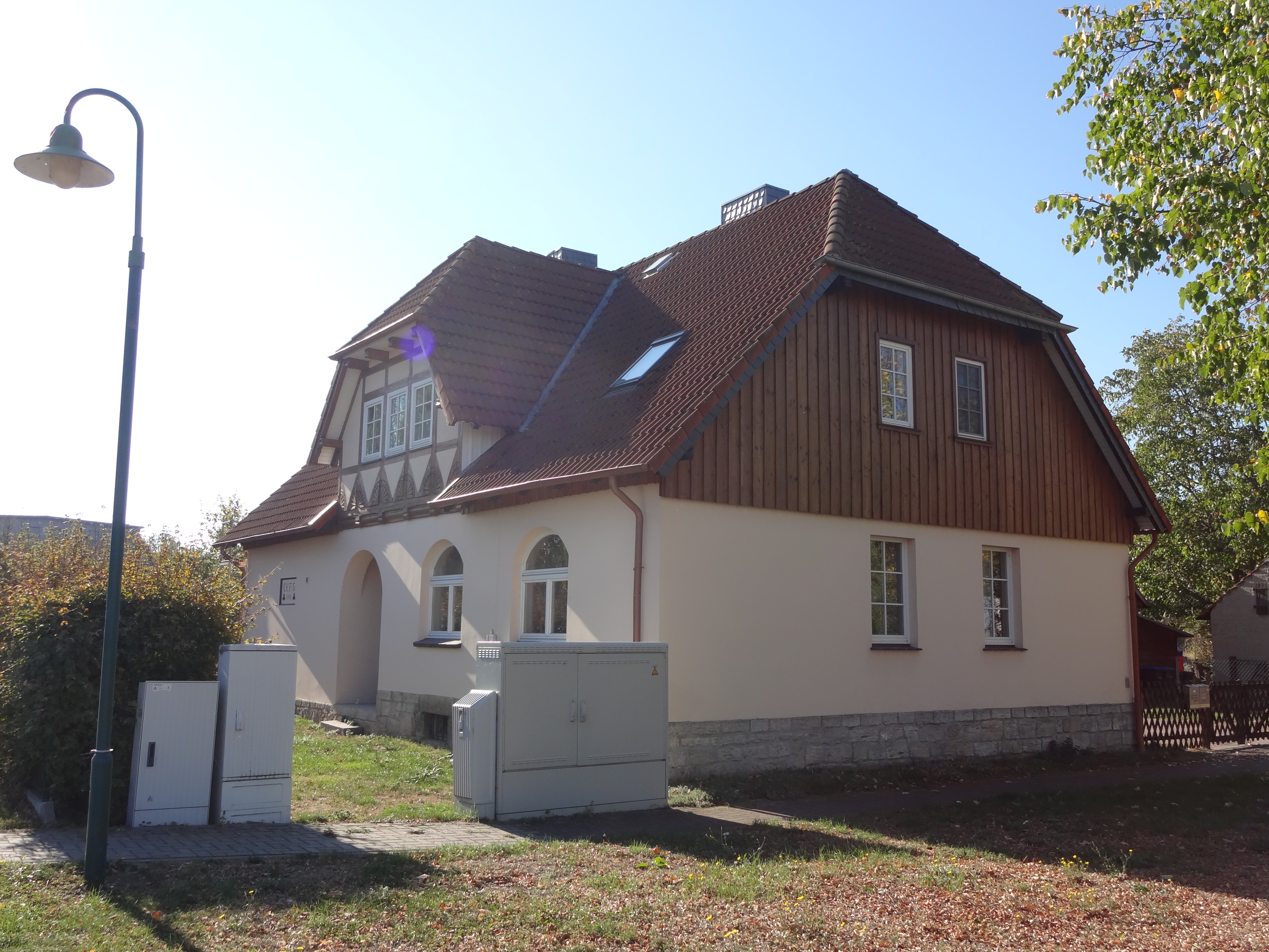 denkmalgeschützte ehemalige Schule in der Wernigeröder Straße 1 in Schmatzfeld (Gemeinde Nordharz)